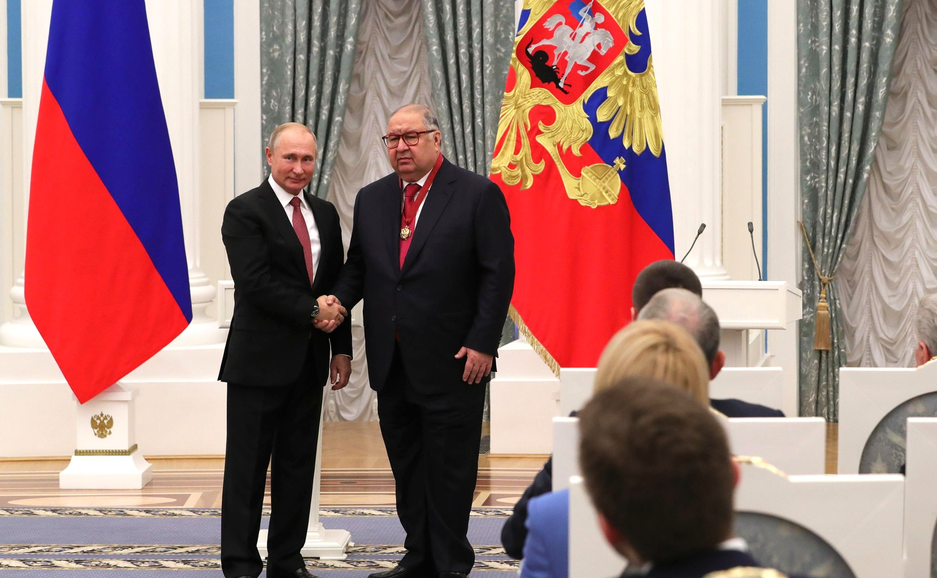 Вручение государственных наград. Орденом «За заслуги перед Отечеством» III степени награждён основной акционер USM Holdings Алишер Усманов.